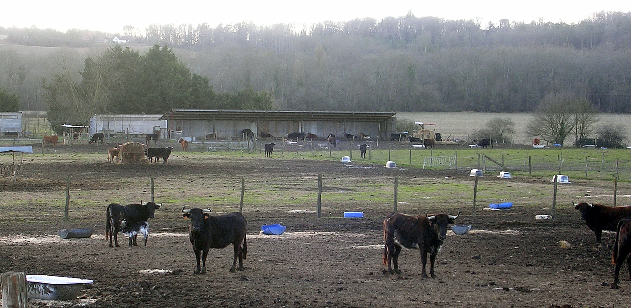 Ganaderia, élevage de coursières (vaches de courses landaises) en Chalosse, dans le département français des Landes